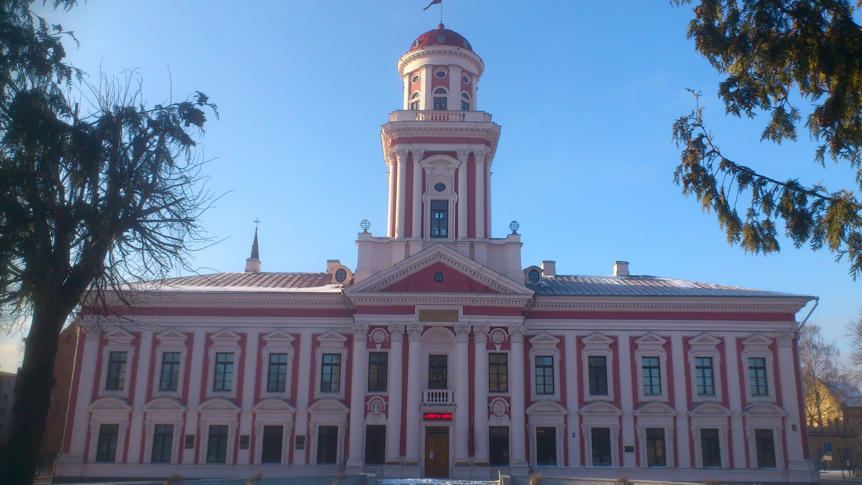 "Academia Petrina", Jelgava, Akadēmijas iela 10